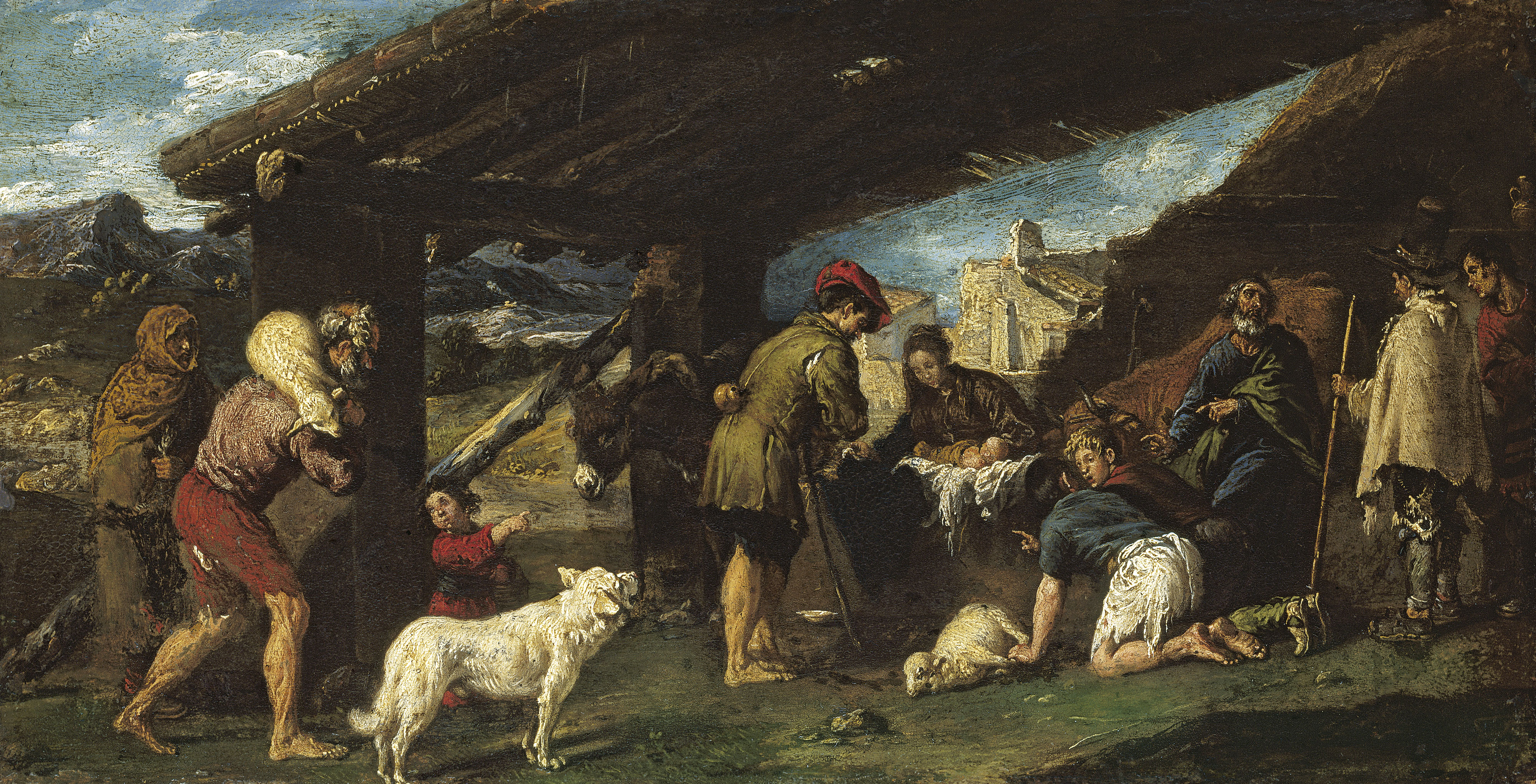 El lienzo representa el momento en que el Niño Jesús, al poco de nacer, fue adorado por un grupo de pastores.